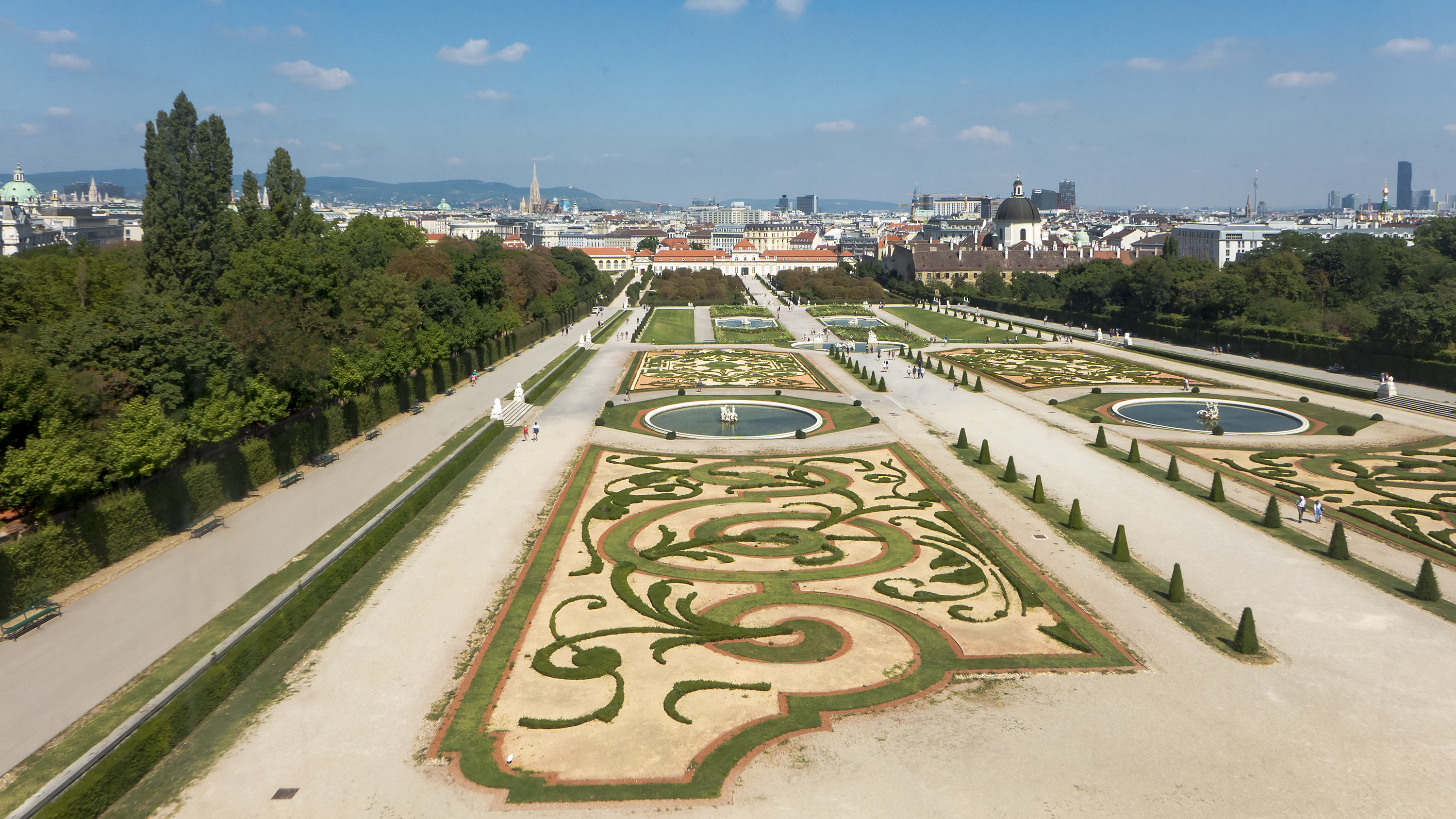 Belvederegarten in Wien 3